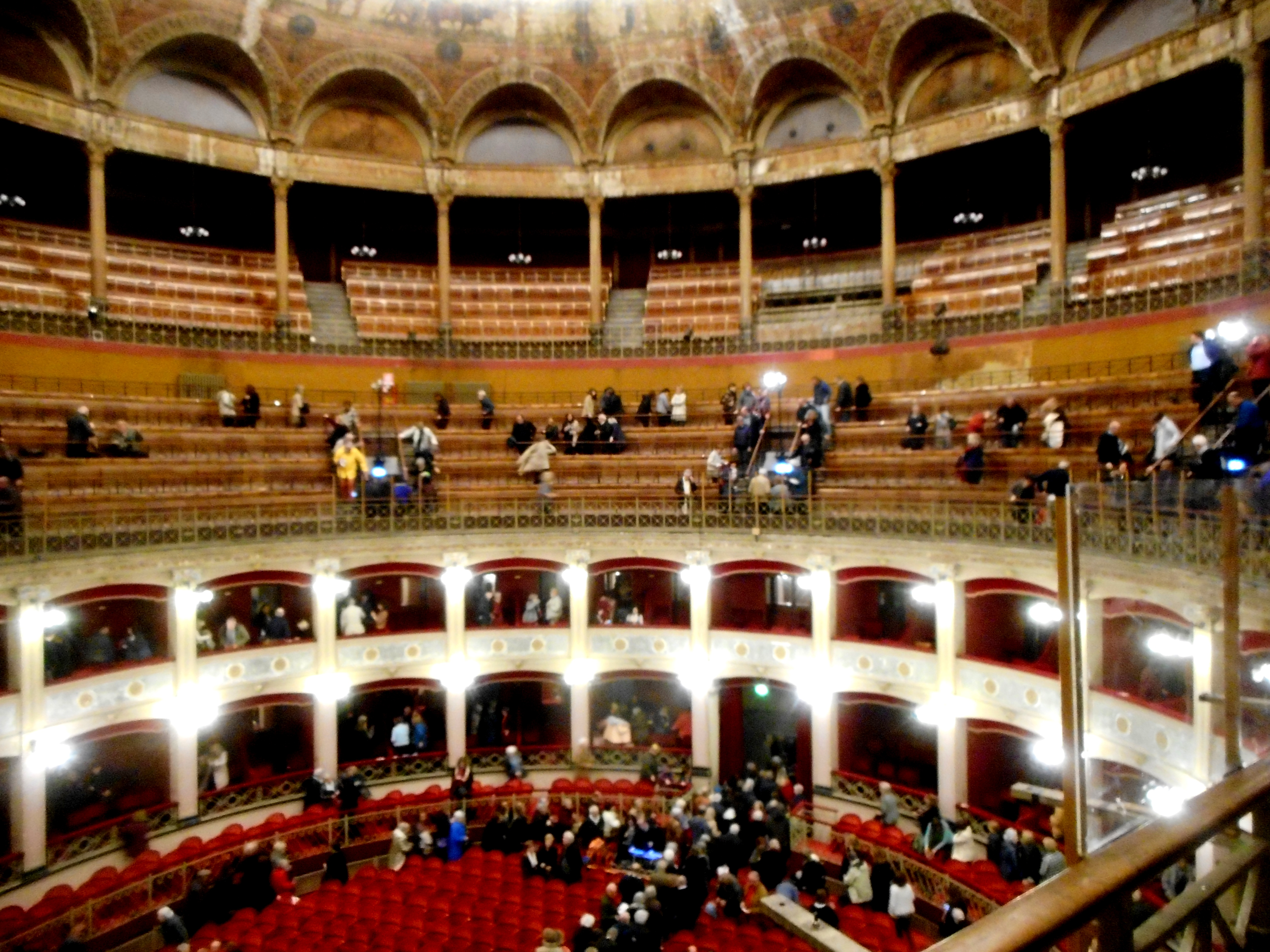 Interno del Politeama Garibaldi visto dal loggione